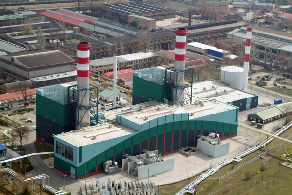 A csepeli erőmű a levegőből. Kombinált ciklusú gázturbinás erőmű. Távfűtéssel mintegy 20 000 lakás hőellátását biztosítja [1]